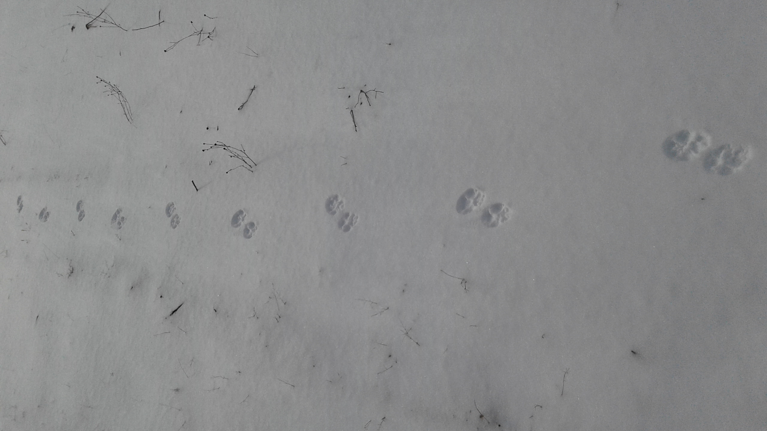 Знято у лісі мобілкою Самсунг